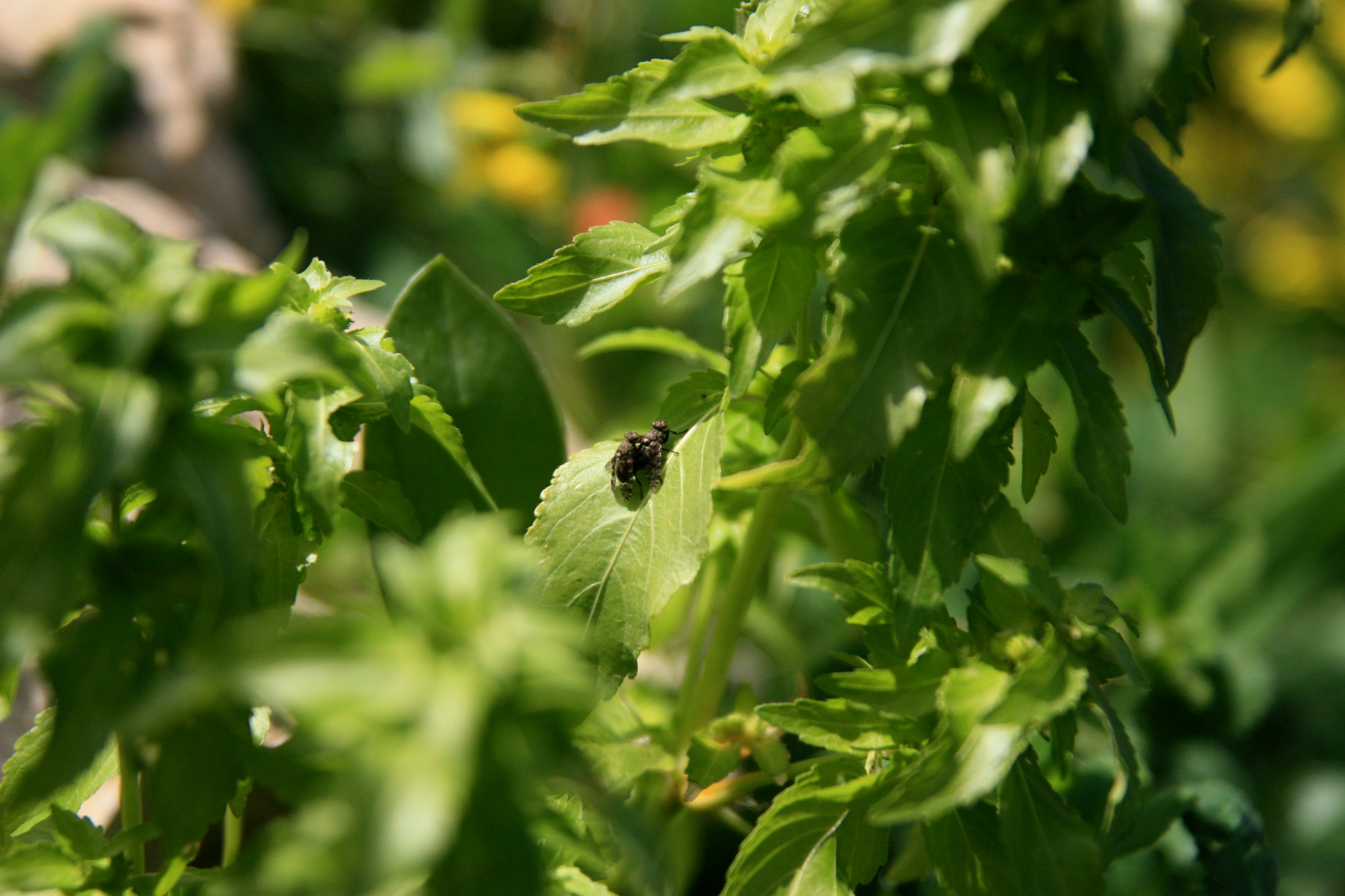 חורשת המייסדים - גבעת השבשבת, נוה שאנן חיפה enI Founders Grove - Pinwheel Hill Haifa